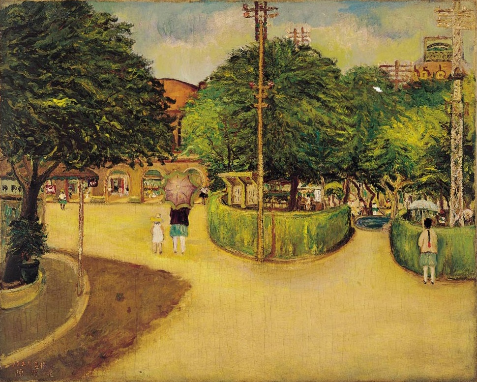 Description in